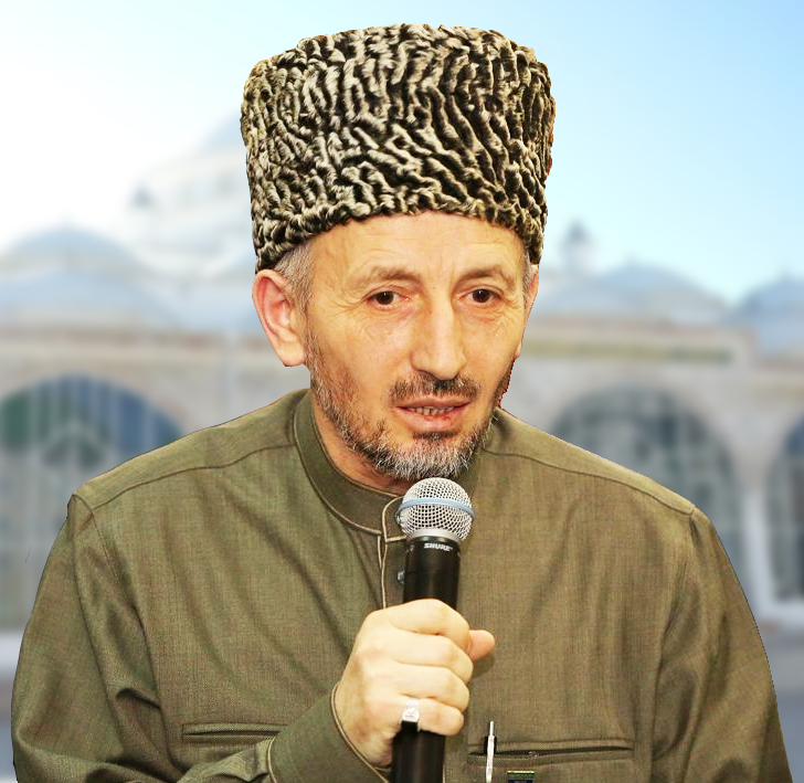 Муфтий Республики Дагестан Ахмад-хаджи Абдулаев